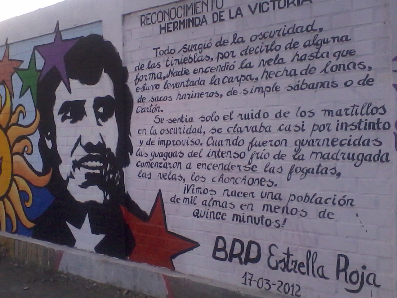 Mural recordando la toma de terrenos en el sector de Cerro Navia. Se visualiza el rostro del cantautor Victor Jara, el cual antes de su muerte en el año 1973 dedica una cancion a esta poblacion y la niña que muere en manos de los carabineros de aquella epoca.